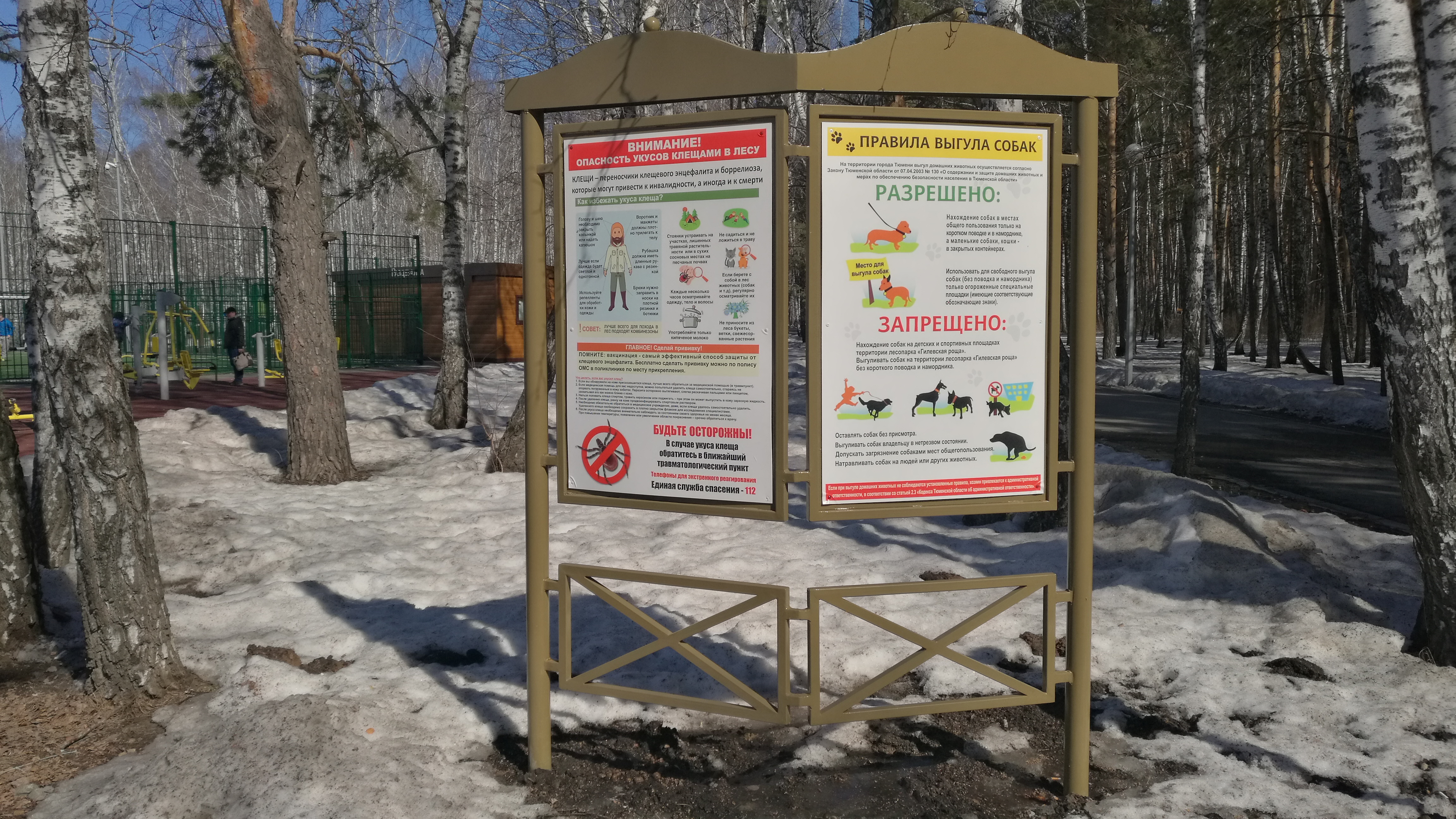 Gilova bosko. Tjumeno, Rusio.